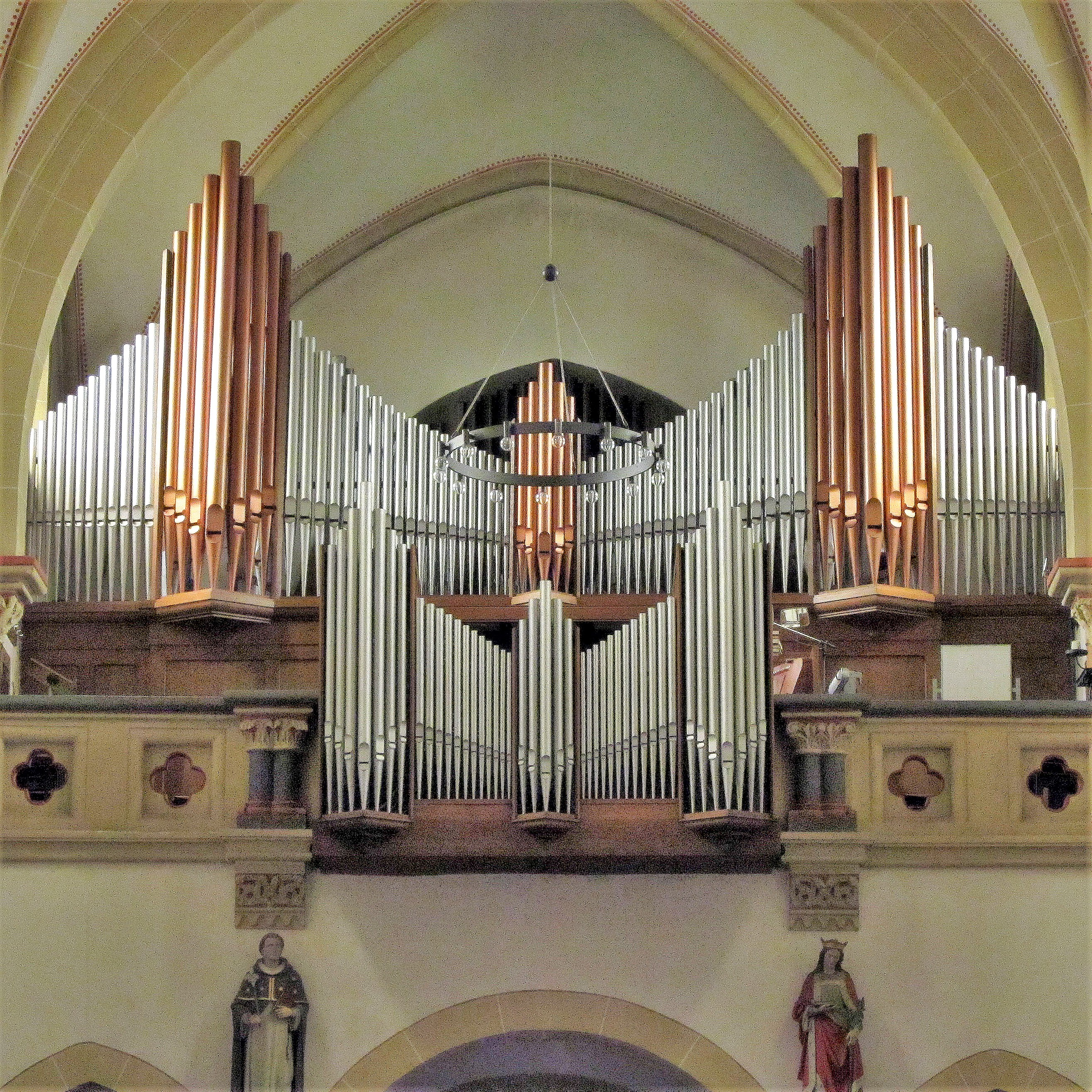 Blick zur Empore und dem Orgelprospekt der katholischen Pfarrkirche St. Marien in Neunkirchen, Saarland